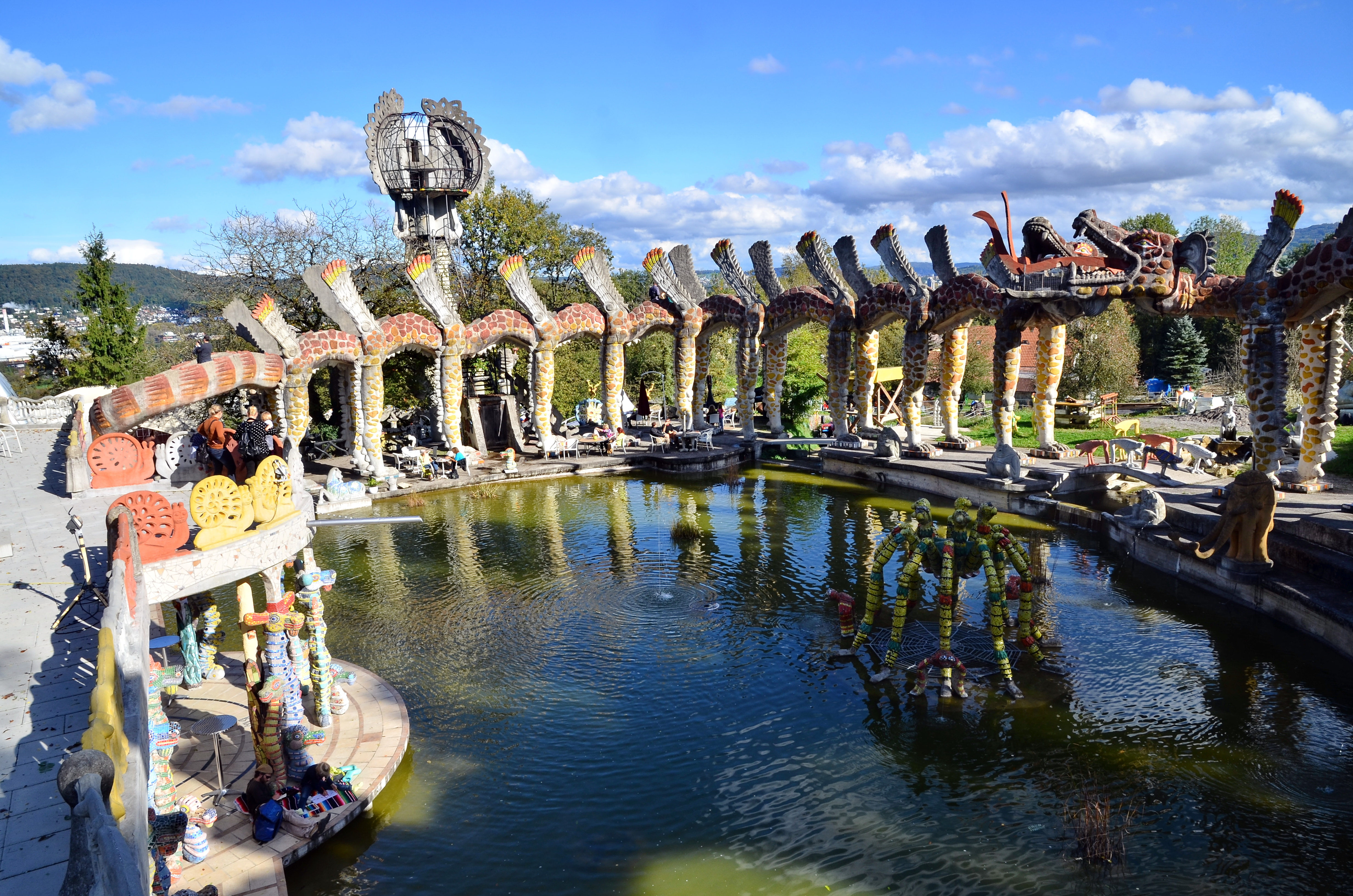 Bruno Weber Park in Dietikon - Spreitenbach (Switzerland)